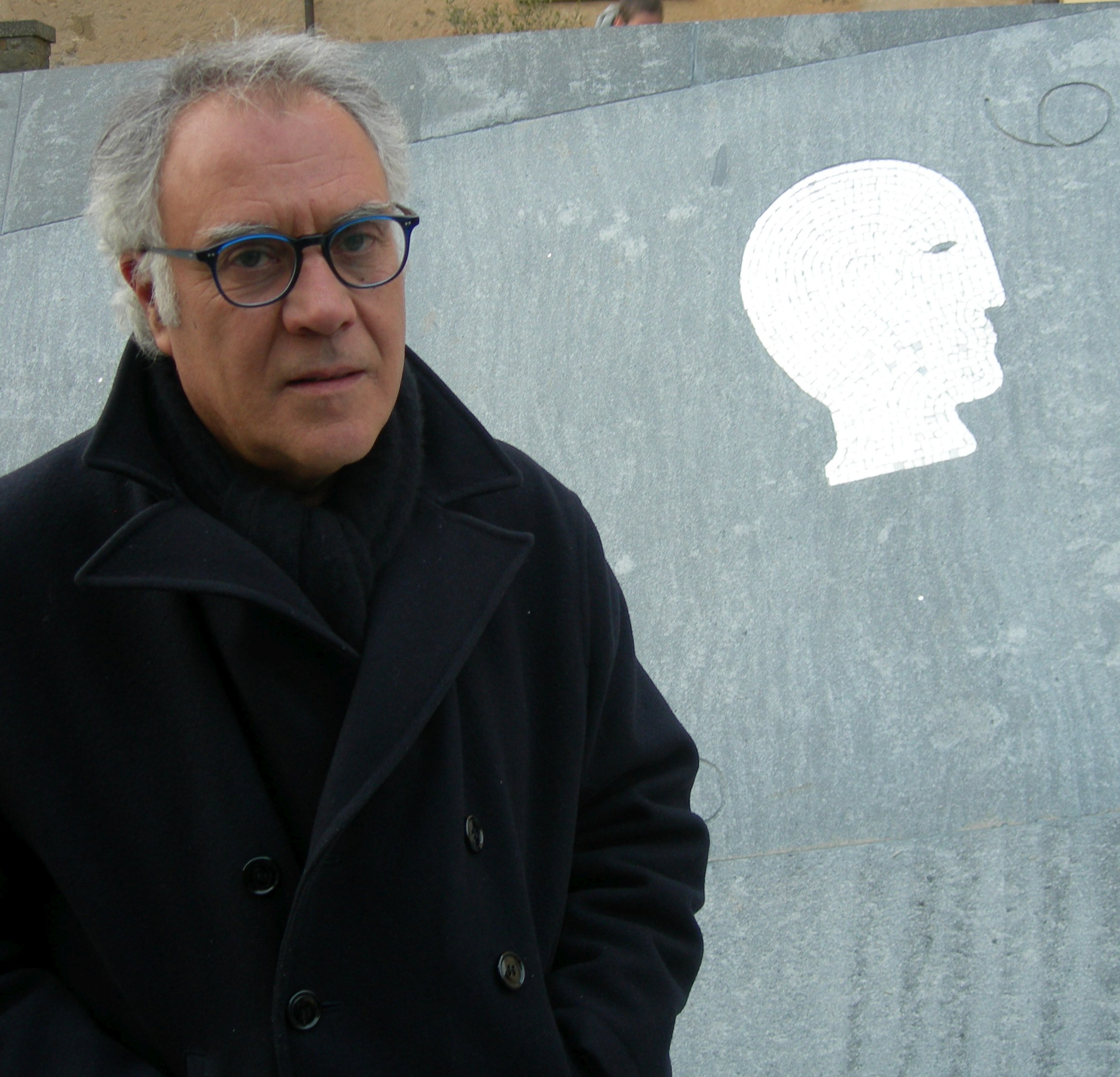 Mimmo Paladino all'inaugurazione della Piazza dei Conti Guidi a Vinci, Toscana, davanti a una delle sue opere in piazza